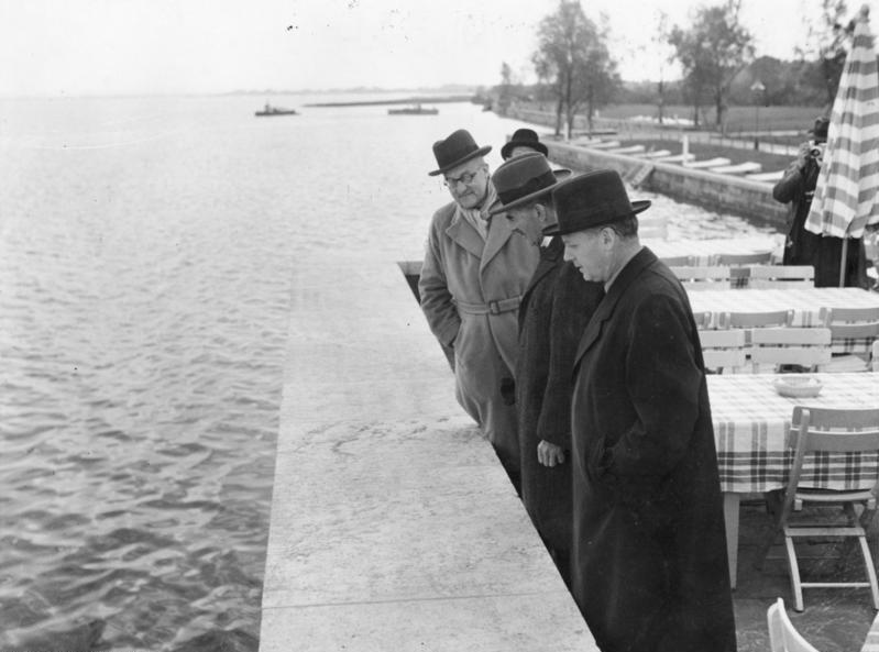 Scherl-Text: Der Besuch des englischen Ministerpräsidenten in Deutschland Auf seiner Rückkehr vom Obersalzberg besichtigte der englische Ministerpräsident das Autobahn-Rasthaus am Chiemsee. UBz Reichsaussenminister v. Ribbentrop, Ministerpräsident Chamberlain und der deutsche Botschafter in London v. Dirksen [Herbert von Dircksen] beim Rundgang. 15.9.38 12280-38 Zentralbild 16.9.1938 Ministerpräsident Chamberlain in Deutschland. Nach seinem Besuch bei Hitler im Berghof auf dem Obersalzberg fuhr der englische Ministerpräsident mit dem Auto nach München zurück, um von dort aus den Heimflug anzutreten. Unterwegs machte er Rast im Autobahn-Rasthaus am Chiemsee. UBz: Auf der Terrasse am Chiemsee (von links) Der deutsche Botschafter in London Dircksen, Neville Chamberlain und Reichsaußenminister von Ribbentrop (außen).